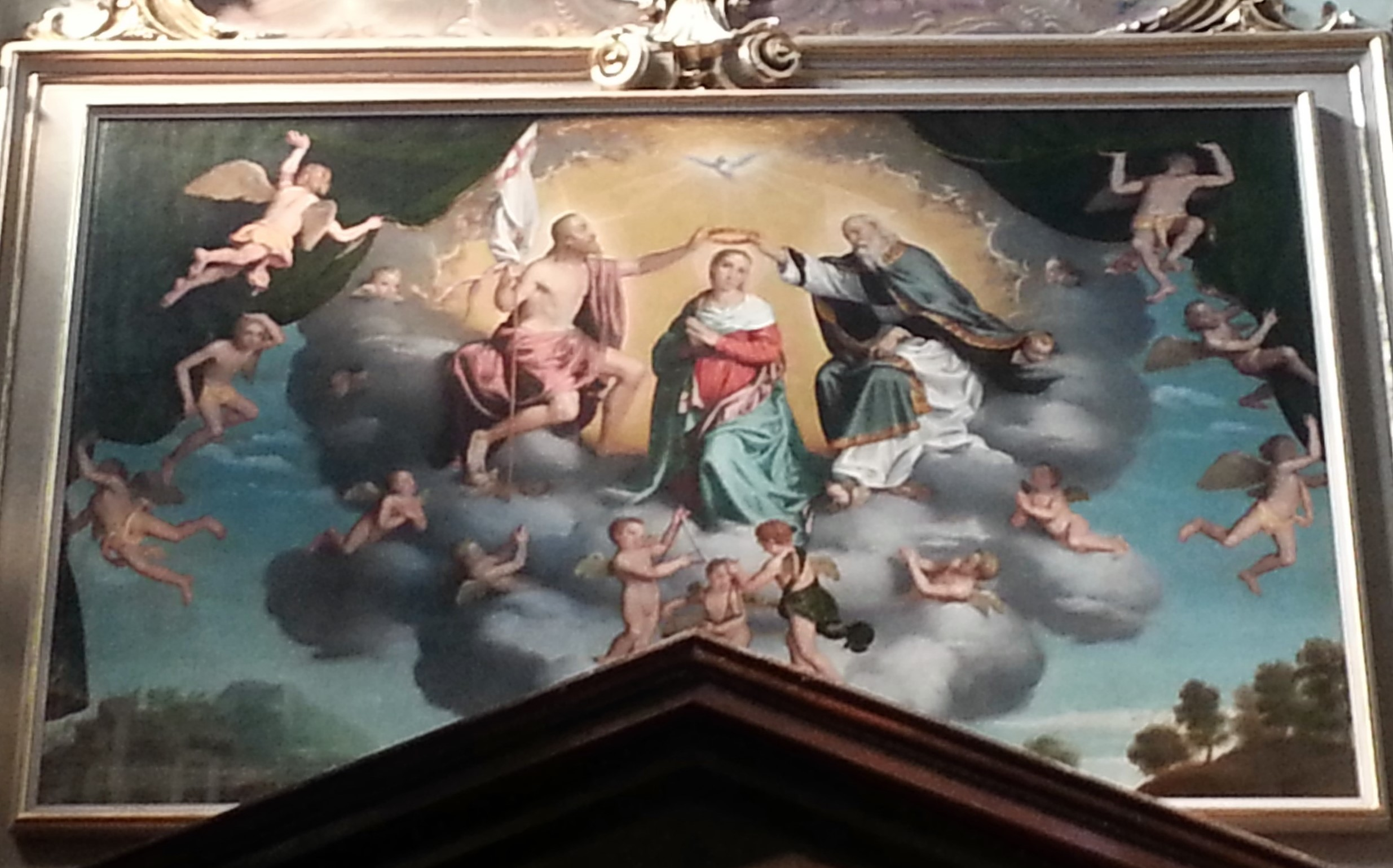 Tela di Gian Battista Moroni - chiesa di Sant'Alessandro della Croce